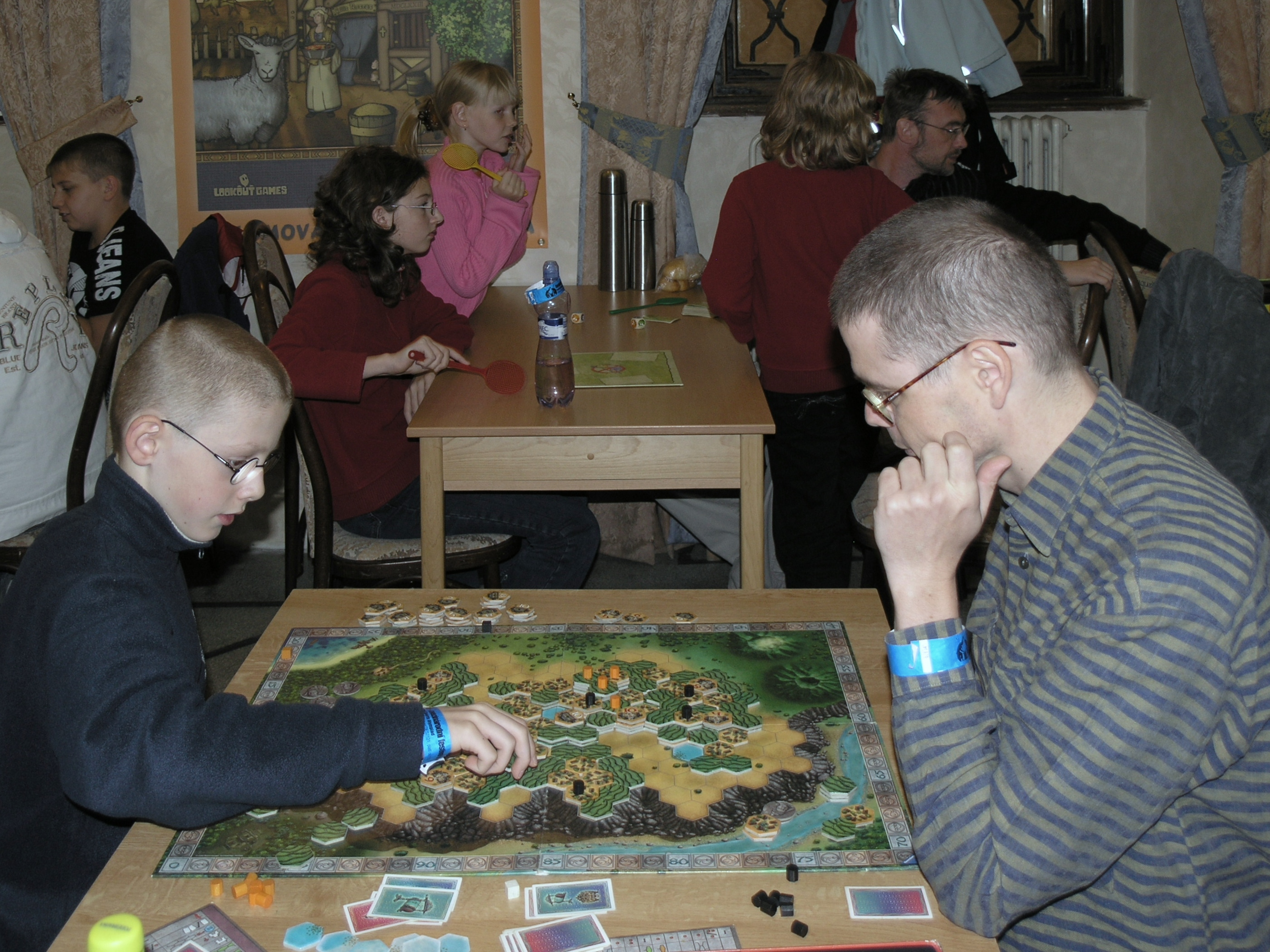 Deskohraní 2008 - volné hraní, Java